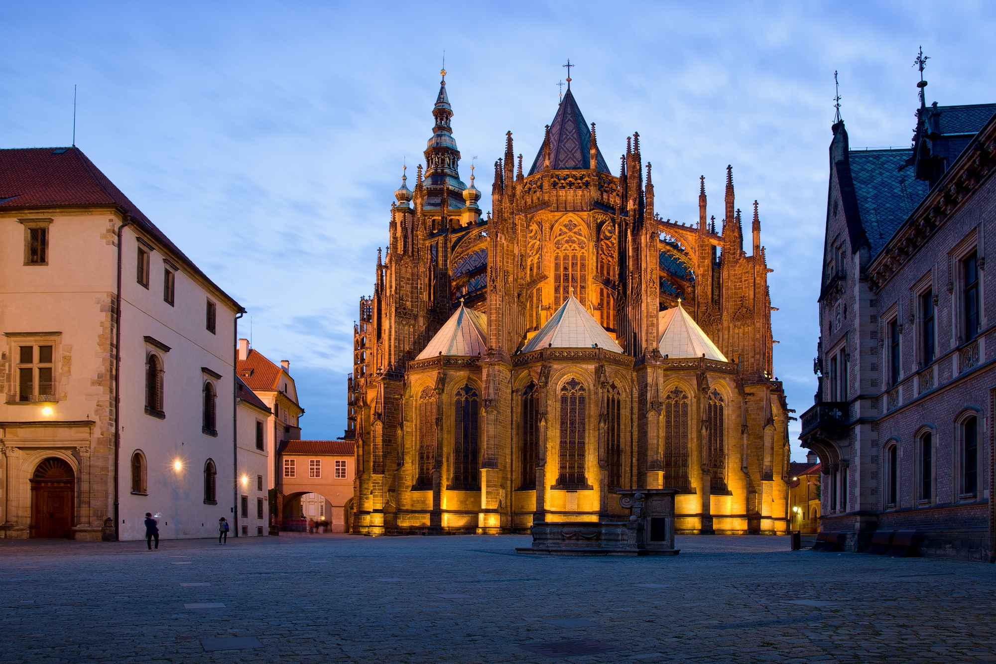 Pražský hrad, Hradčany.